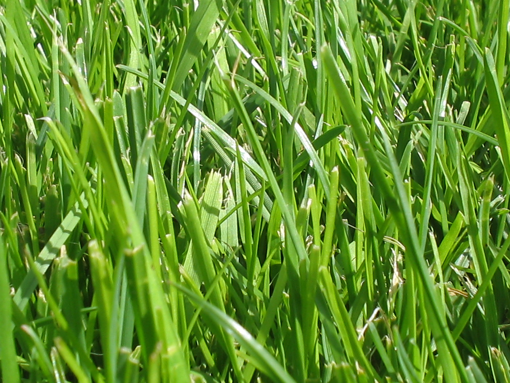 ingezoomd op een stukje plantsoengras.